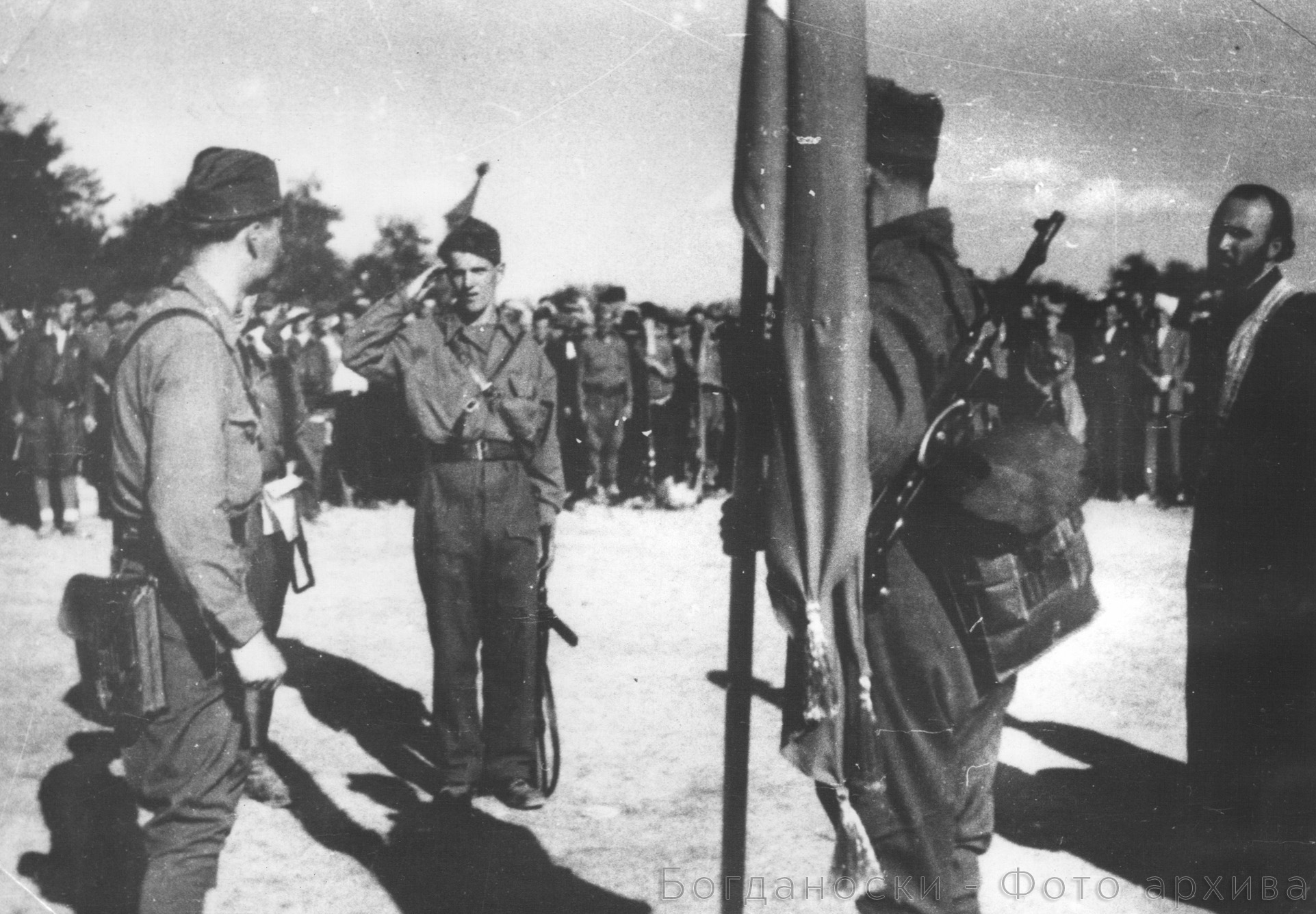 Оригинална фотографија од формирањето на Петнаесеттата Македонска (Поречка) бригада, во присуство на свештено лице.